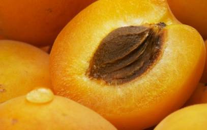 Buah aprikot